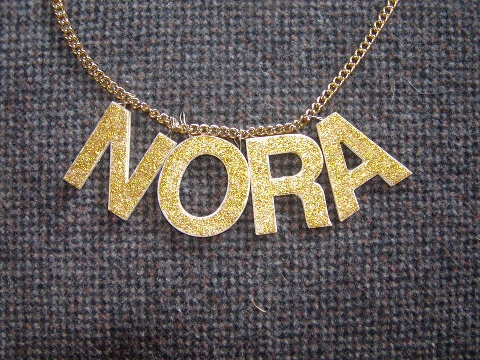 NORA-Kette von Thomas Anders (Modern Talking)